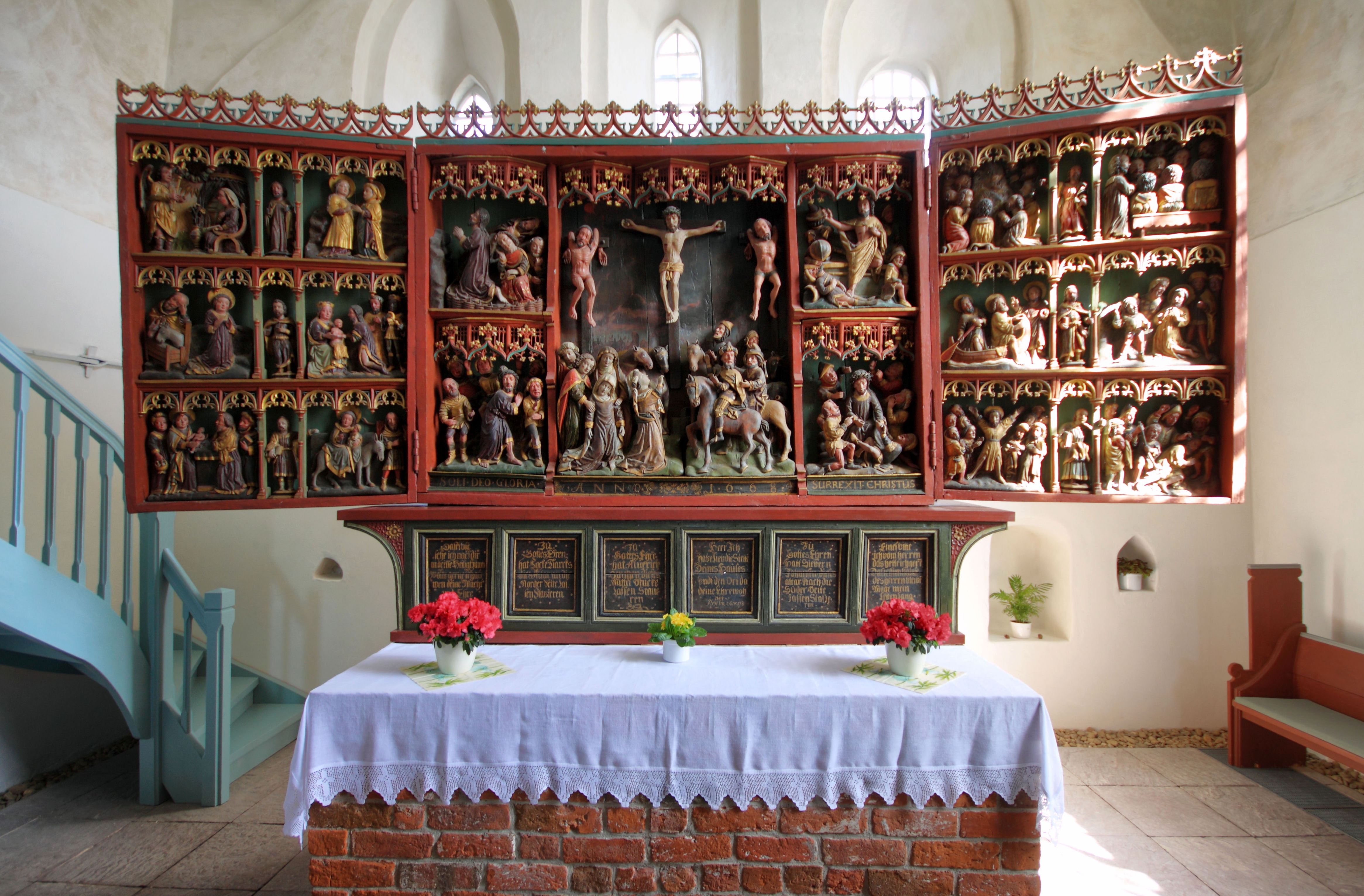 Altar in Funnix